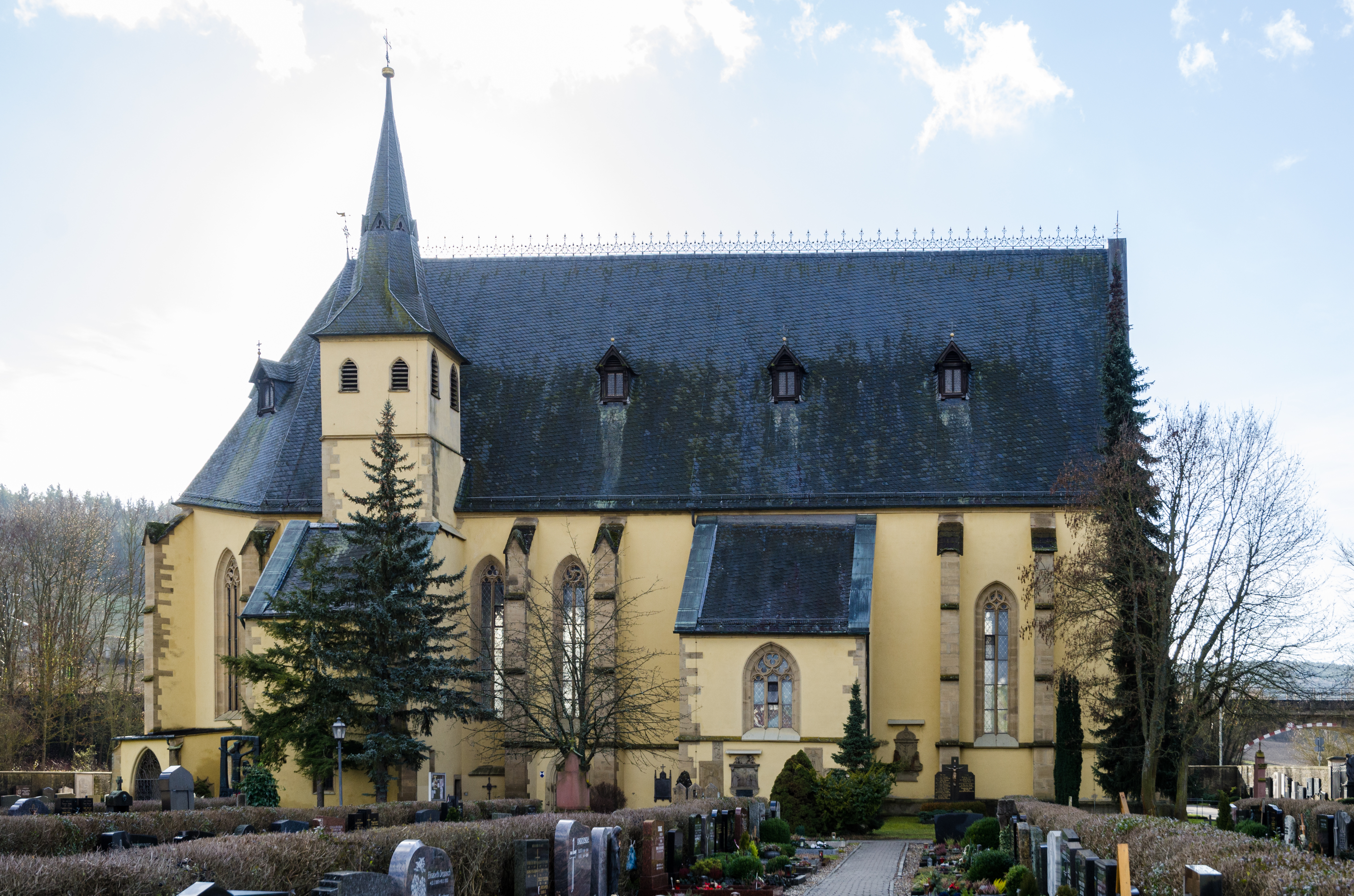 Maria Sondheim, Außenansicht